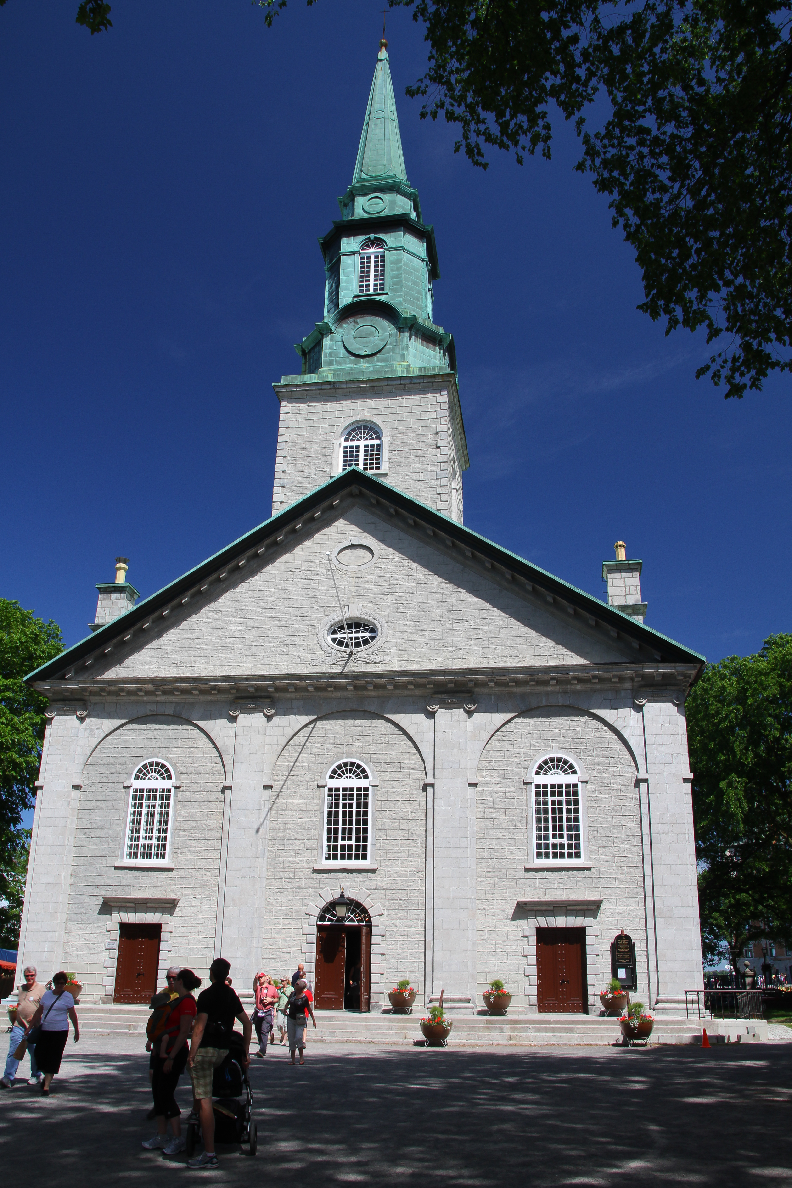 Cathédrale anglicane Holy Trinity, à Québec. Première cathédrale anglicane à être construite à l'extérieur des Îles britanniques, elle a influencé l'architecture religieuse au Québec.